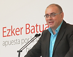 Javier Madrazo, coordinador general de Ezker Batua - Berdeak de 2001 a 2009